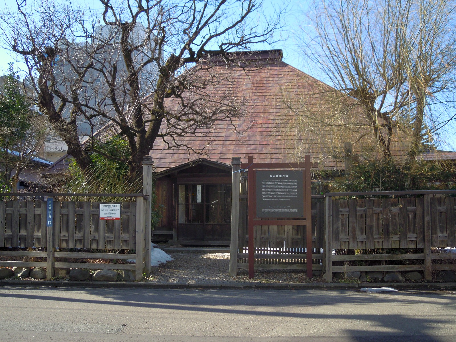 岩手県盛岡市にある「啄木新婚の家」。